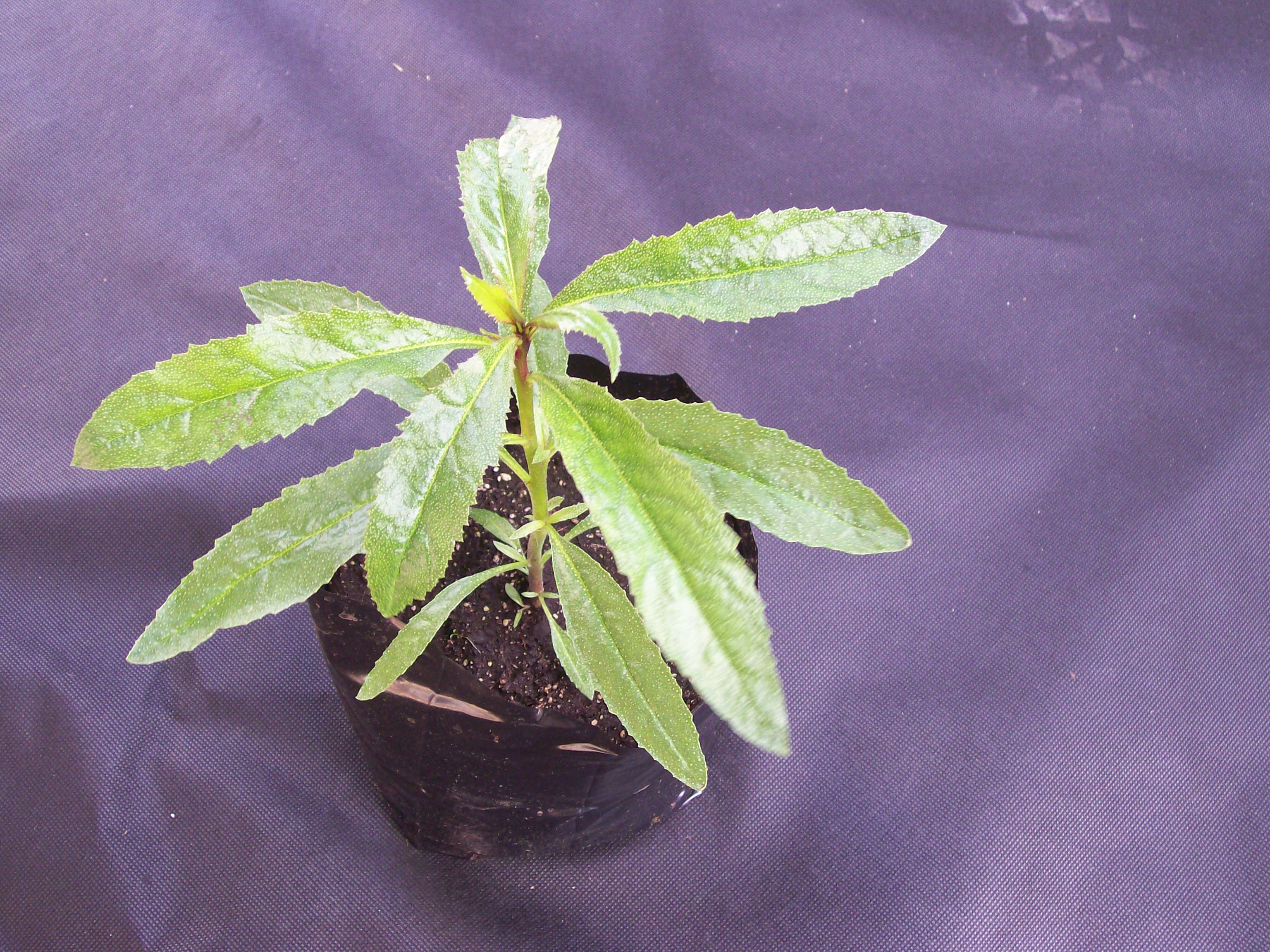 Juvenile Myoporum laetum (Ngaio)